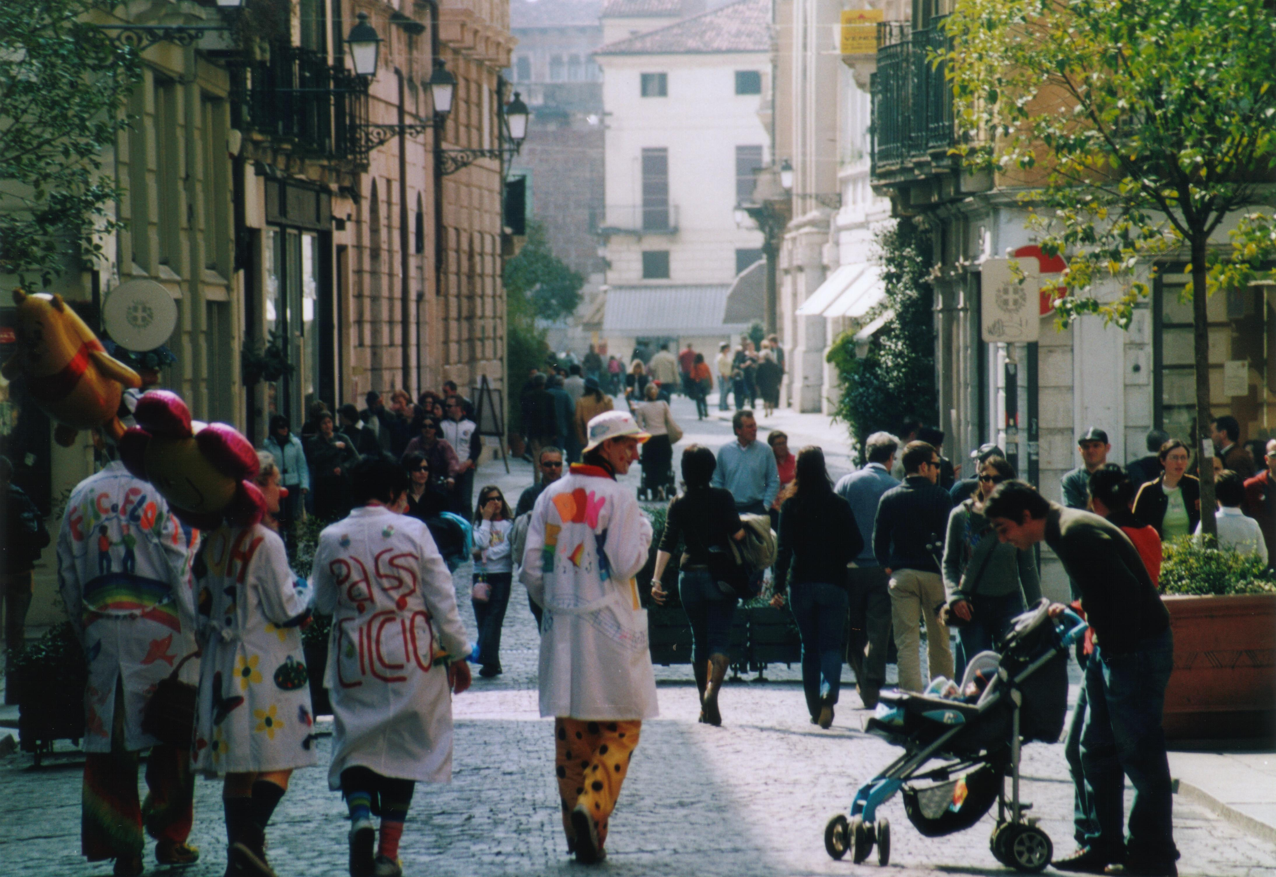 Corso Palladio con i "Dottori del Sorriso". Vicenza, Veneto, Italia.